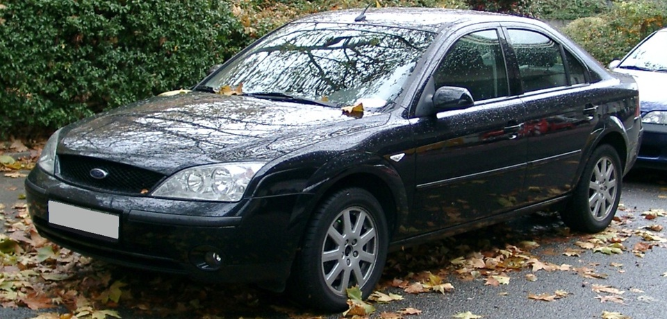 Imagen tomada en el año año 2007, con una cámara marca CASIO QV-4000.